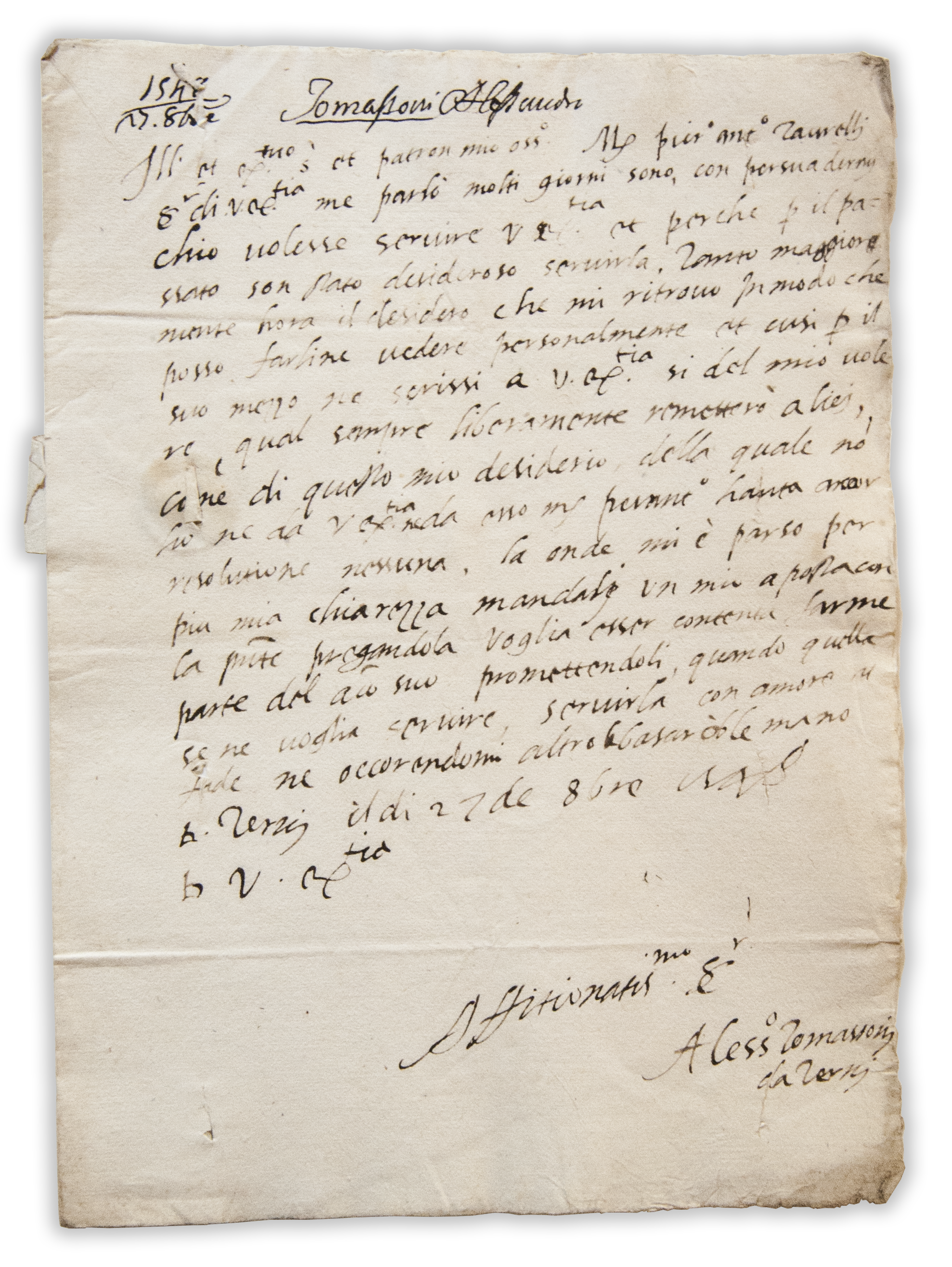 Lettera di A. Tomassoni al Duca di Ferrara P. Farnese.